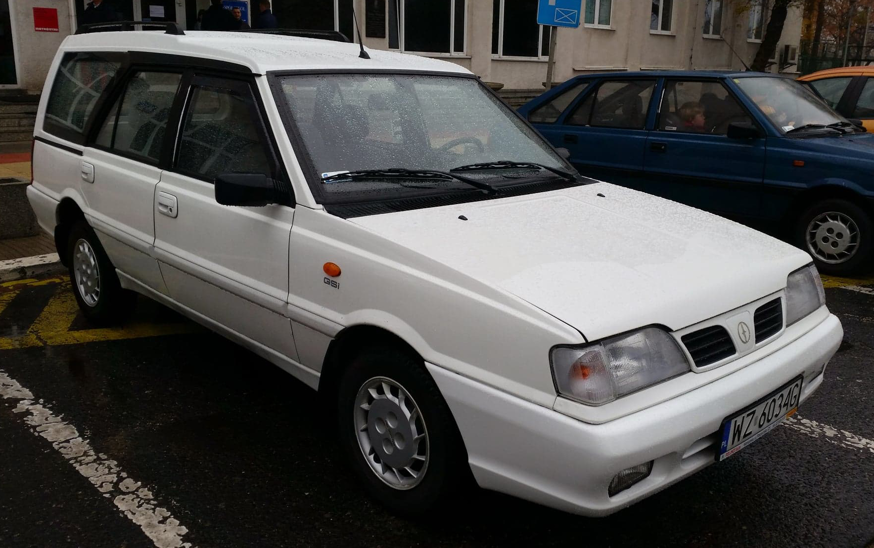 Daewoo-FSO Polonez Kombi